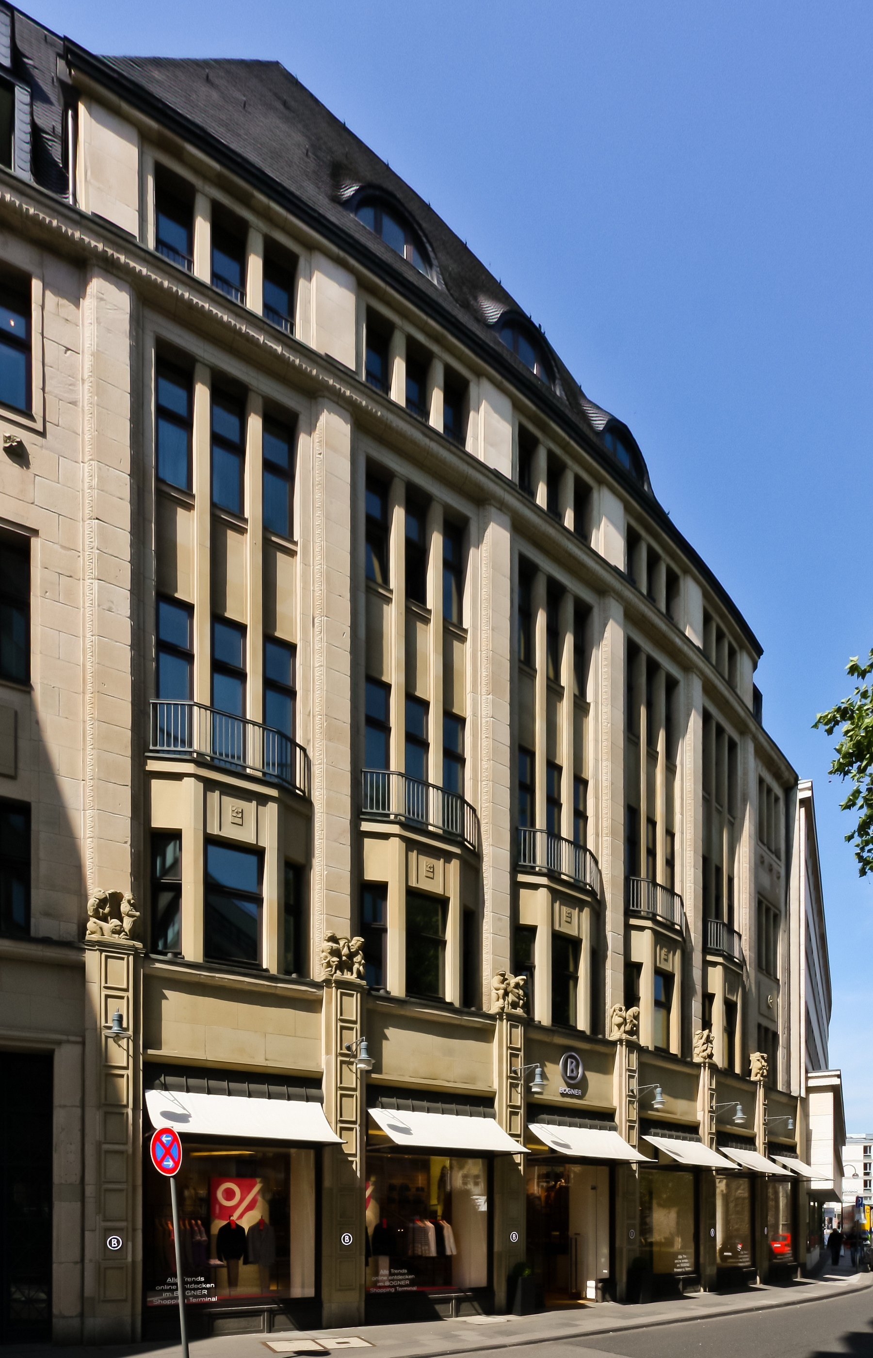 Denkmalgeschütztes Büro- und Geschäftshaus Brückenstraße 17, Köln. Architekt: Georg Falck (1878-1947). Bauzeit: 1914. An der Fassade befinden sich Skulpturen, die Szenen aus der Märchen „Des Kaisers neue Kleider“ darstellen.